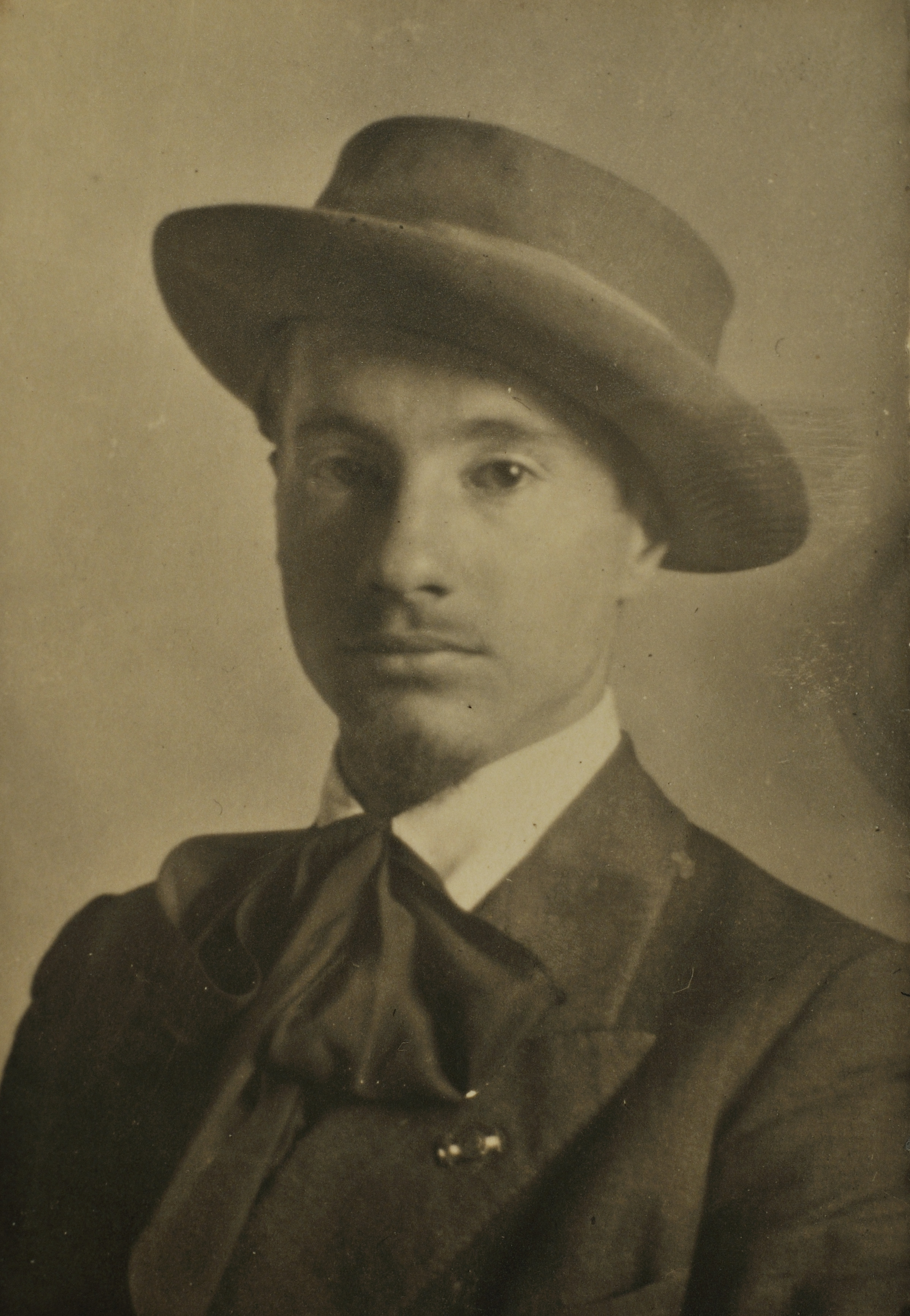 Fotografia del poliedrico artista molisano, in tenuta da studente del Liceo Artistico di Campobasso.